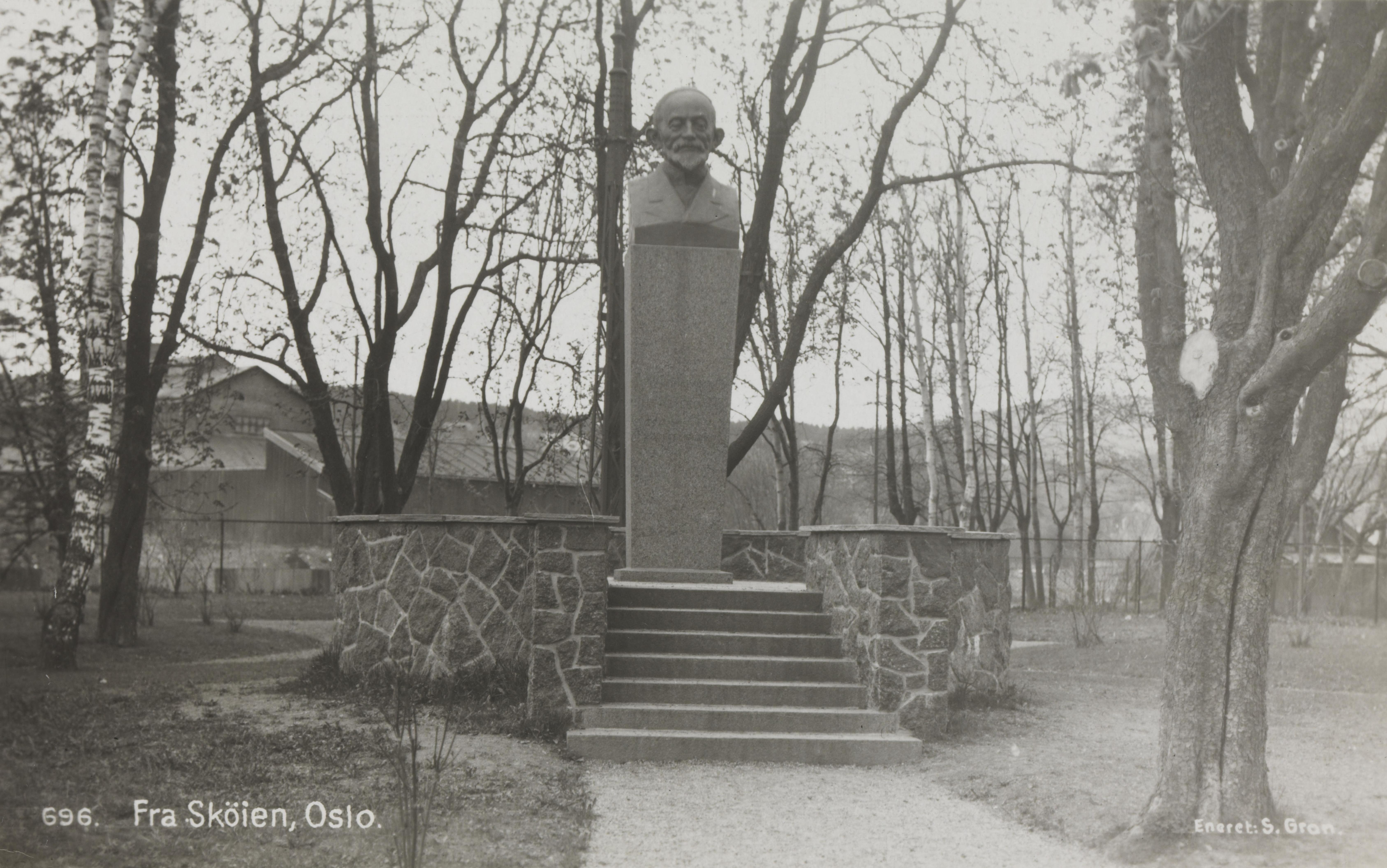 Bildet er hentet fra Nasjonalbibliotekets bildesamling. Skøyen, Oslo, Oslo. Byste av Halvor Emil Heyerdahl (1840-1917), grunnlegger av Holmenkollbanen. Bysten var reist på Skøyen i 1924, flyttet til Majorstuen stasjon i 1980. Utført av Gustav Lærum.